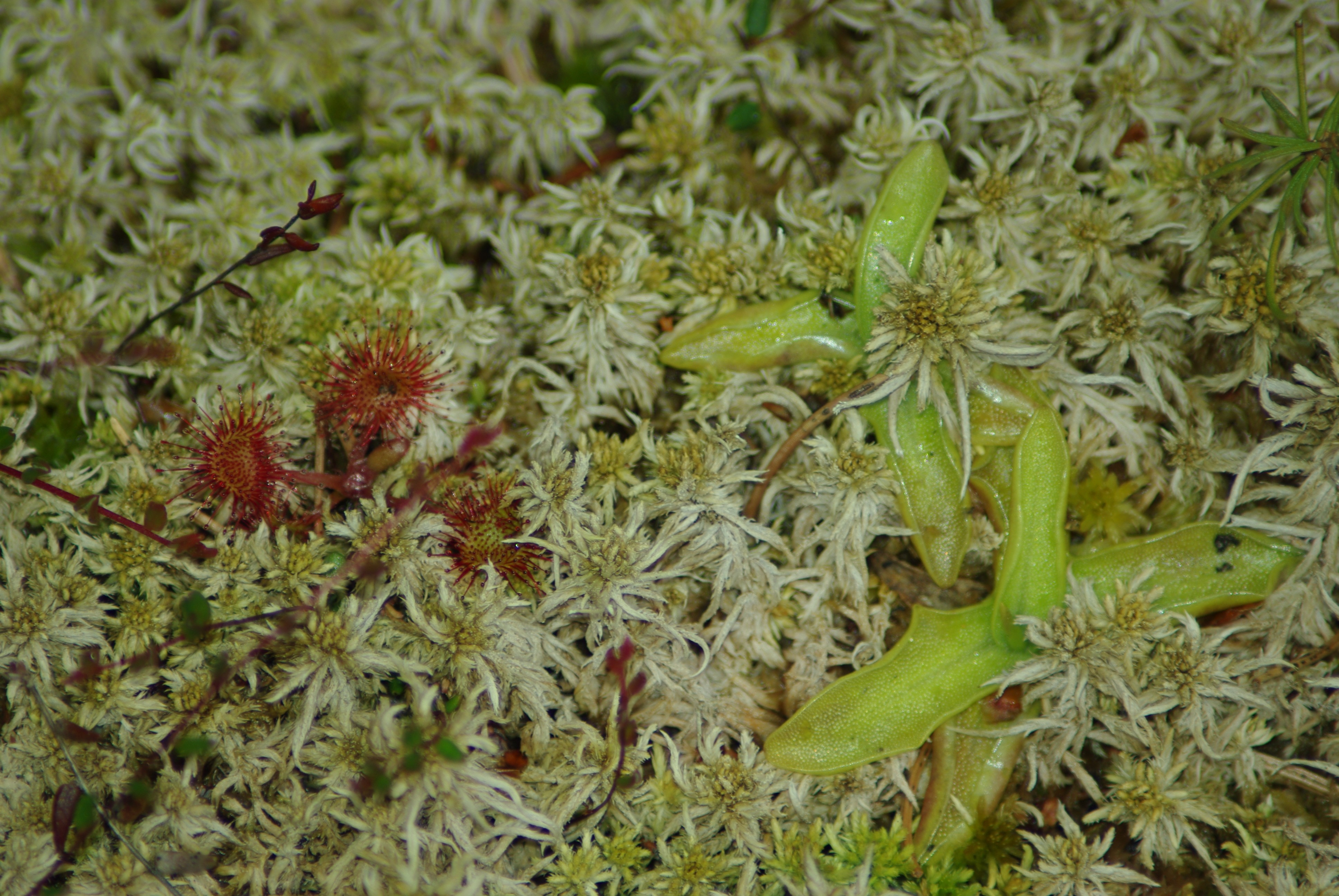 masožravé rostliny, rosnatka okrouhlolistá a tučnice obecná rostoucí pospolu v přírodní rezervaci Smraďoch.